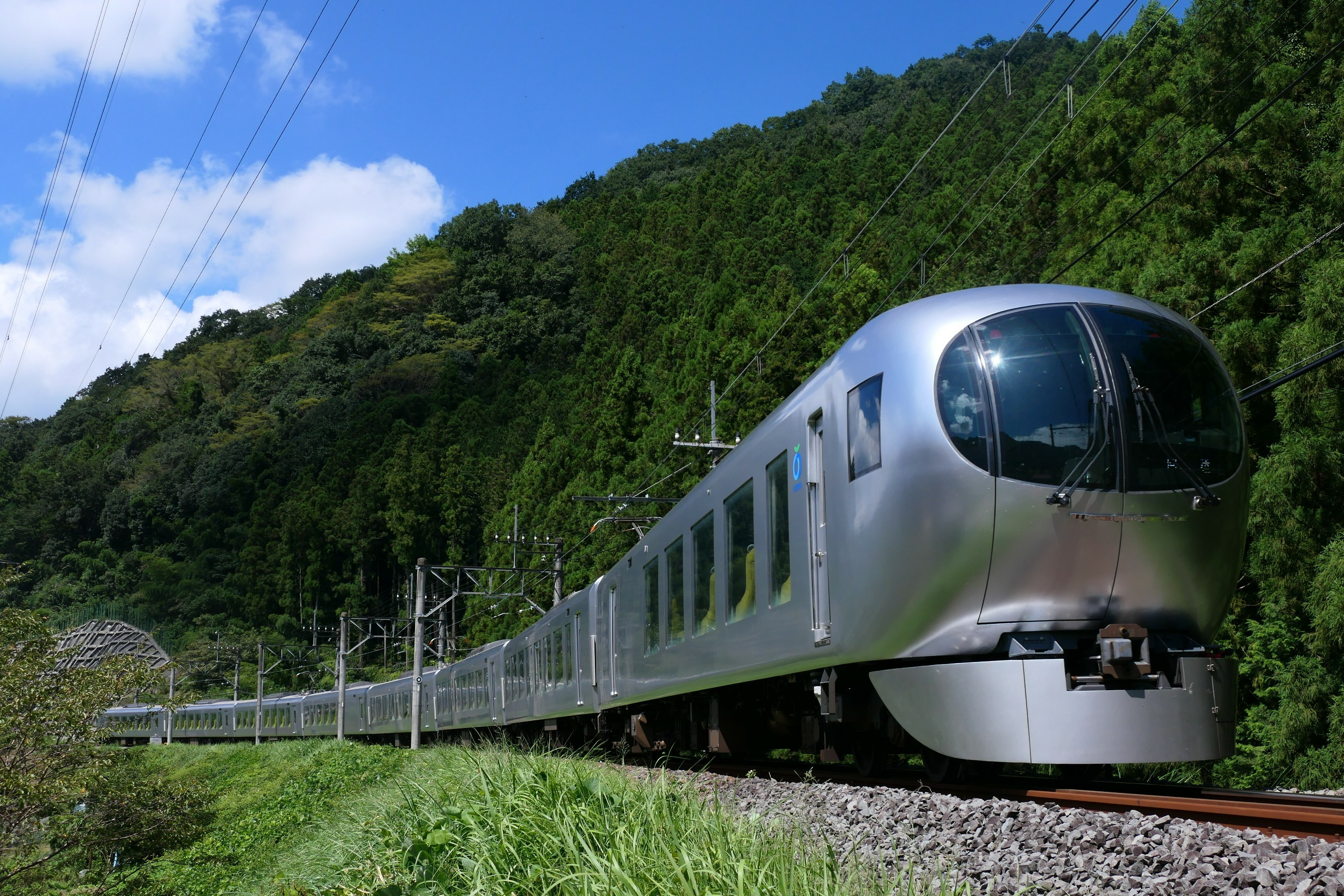 西武鉄道001系電車。東 (ひがし)吾 (あが)野 (の) - 吾 (あが)野 (の)駅間にて。